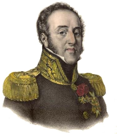 Portrait of Louis Gabriel Suchet